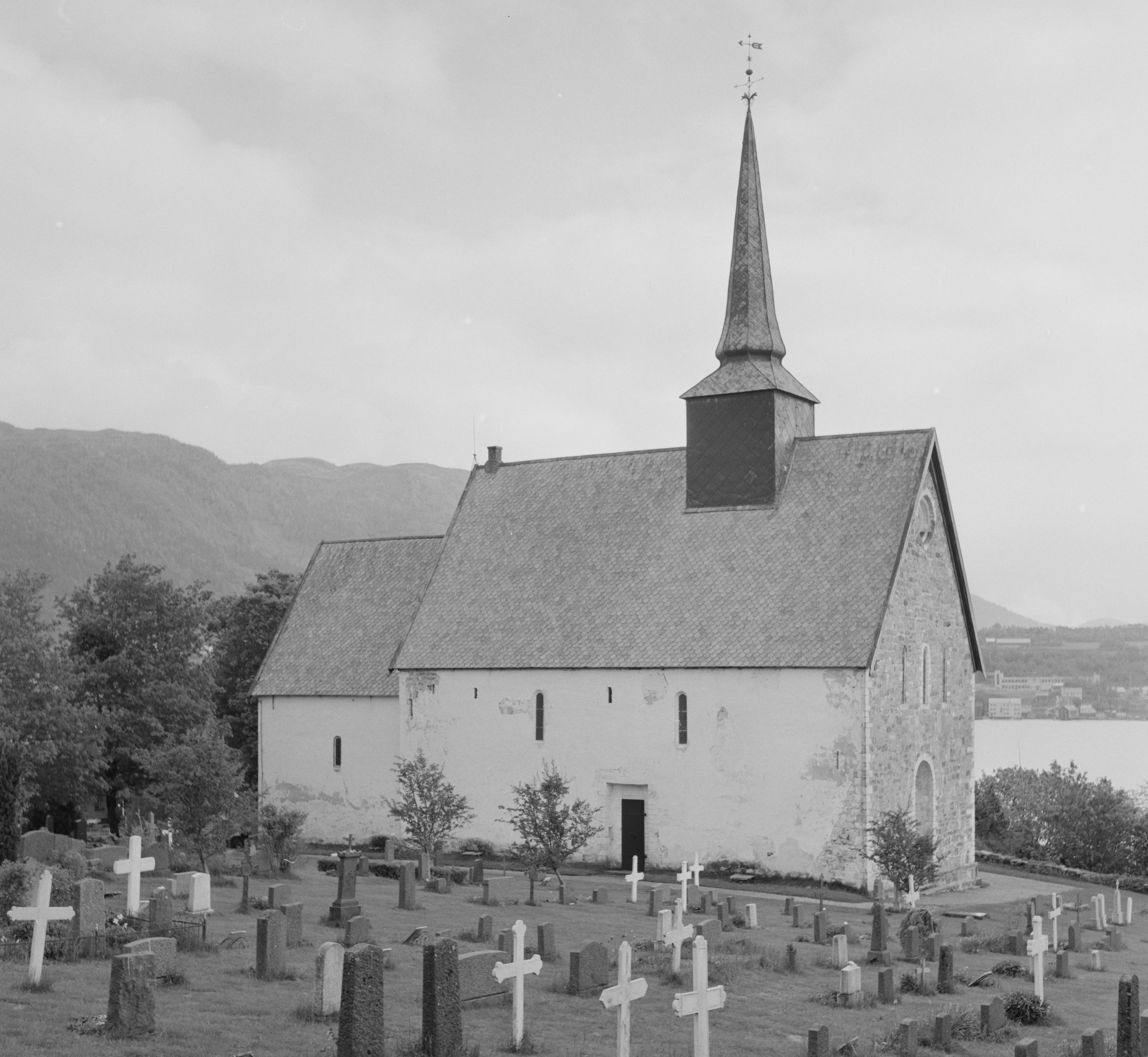 Bildet er hentet fra Nasjonalbibliotekets bildesamling. Anmerkninger til bildet var: Fotograf: E-KQ Tingvoll, Tingvoll, Møre og Romsdal